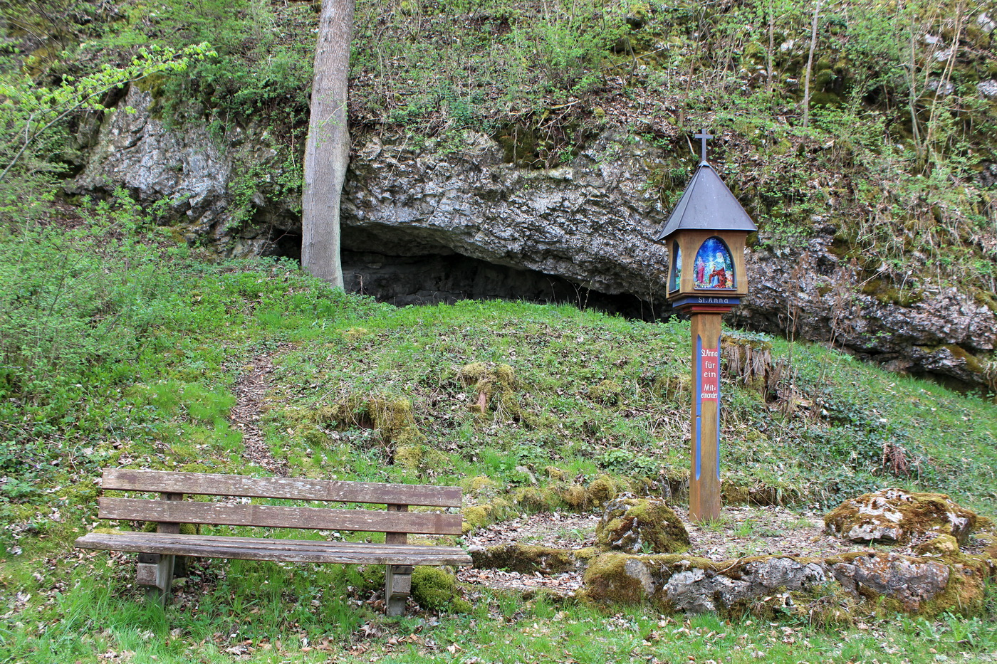 Platz unterhalb der Anna-Kapellen-Höhle (Naturdenkmal) oberhalb von Veringenstadt in einem Felsen des Weißen Jura. Die Höhle wurde nach der früher hier stehenden St. Annakapelle benannt. Der Höhleneingang ist nach Norden ausgerichtet. Die Stele erinnert an die St. Anna-Kapelle, die an dieser Stelle 1515 erbaut wurde. Der erste Kirchenpfleger war der Maler Peter Strüb aus Veringenstadt. 1817 wurde die Kapelle abgebrochen. Die Stele wurde von Ilse Wolf aus Inneringen gestaltet und am 1. Mai 1998 eingeweiht.